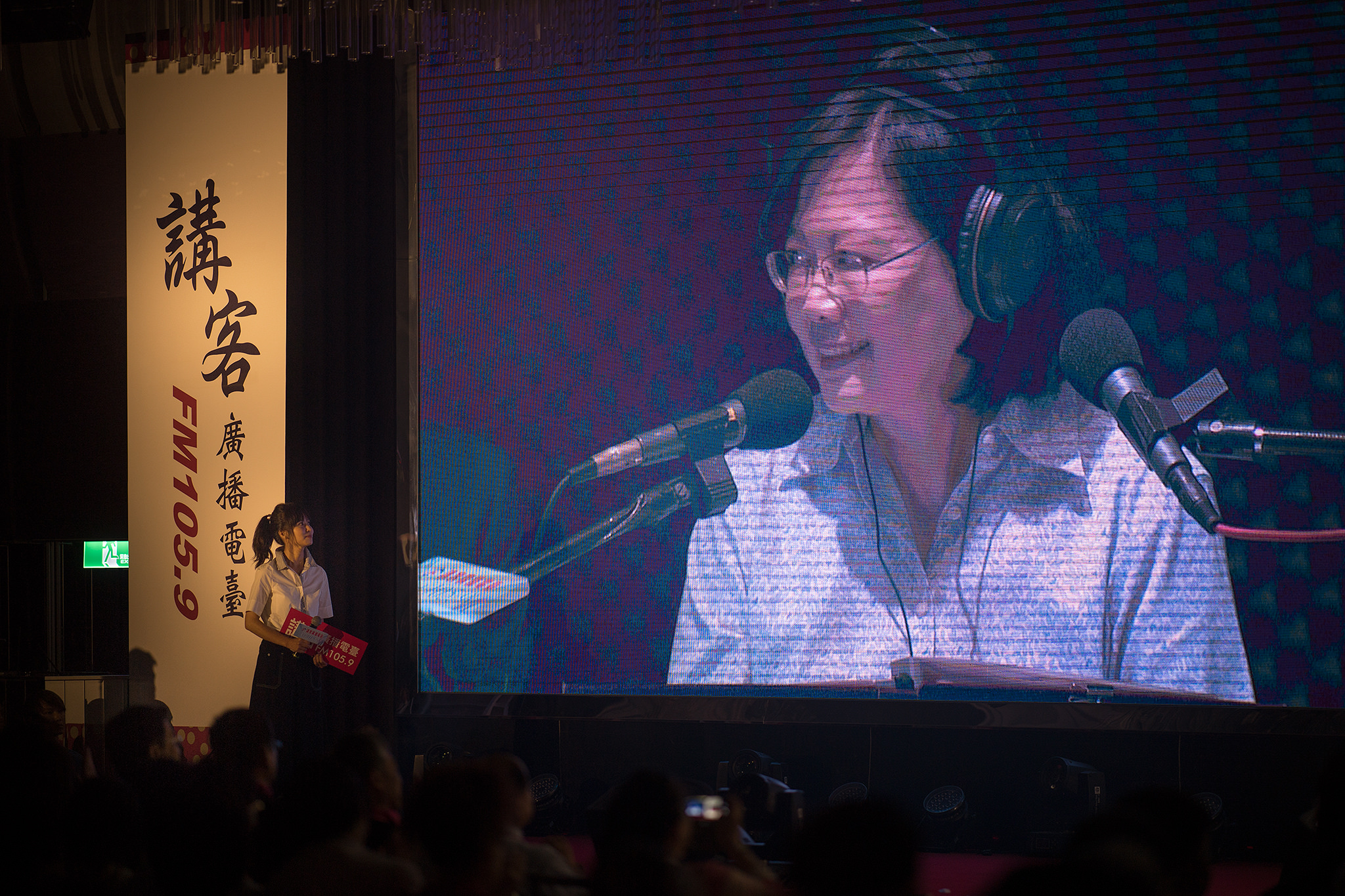 06.23 總統出席「講客廣播電臺開播茶會」，以客語致詞表示，今天是「講客廣播電臺」開播的重要日子，非常高興能夠見證大家在推廣、傳承客家語言文化的工作，又往前邁進一大步